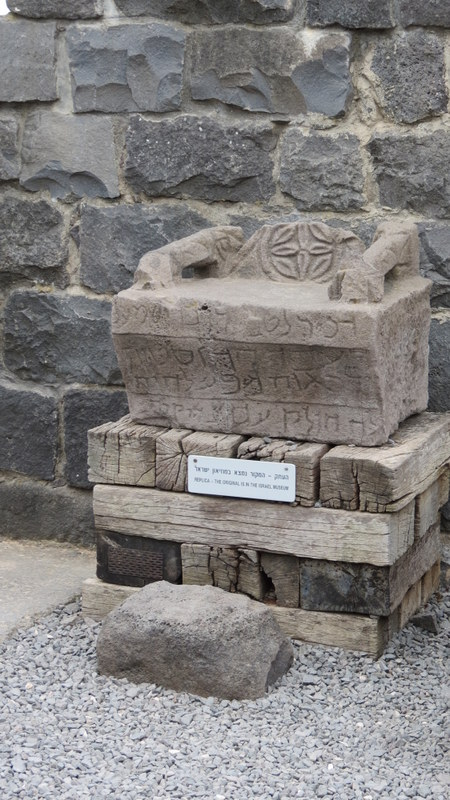 Korazim - Chorazin, Israel כורזים